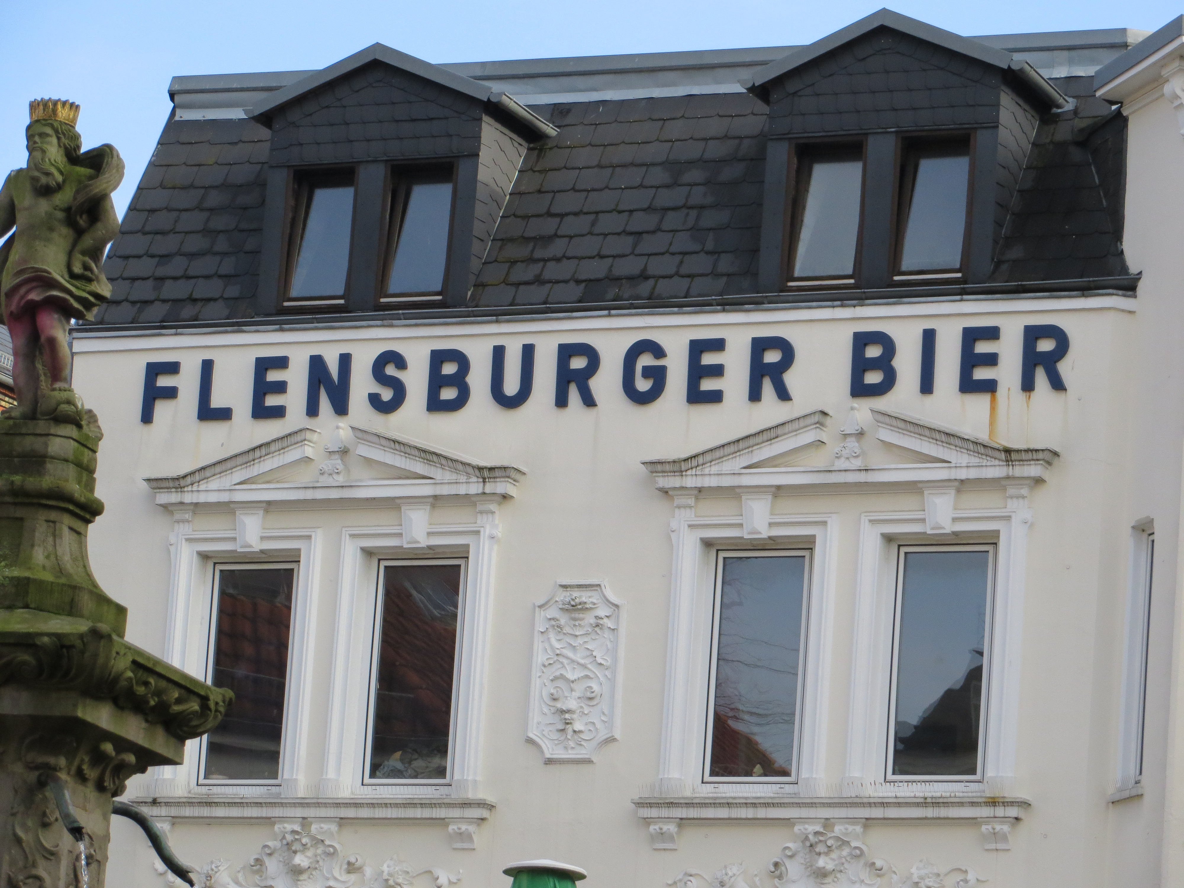 Flensburger Bier, Schriftzug am Nordermarkt, Bild 03